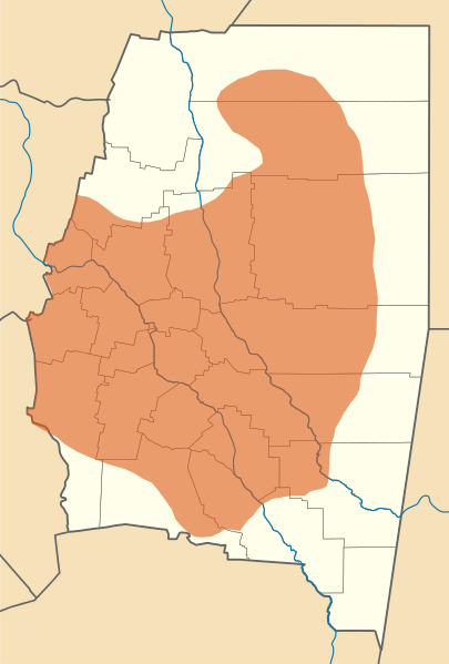 La Cultura Averías se desarrolló entre el año 1200 y el 1500 aproximadamente en la provincia argentina de Santiago del Estero.